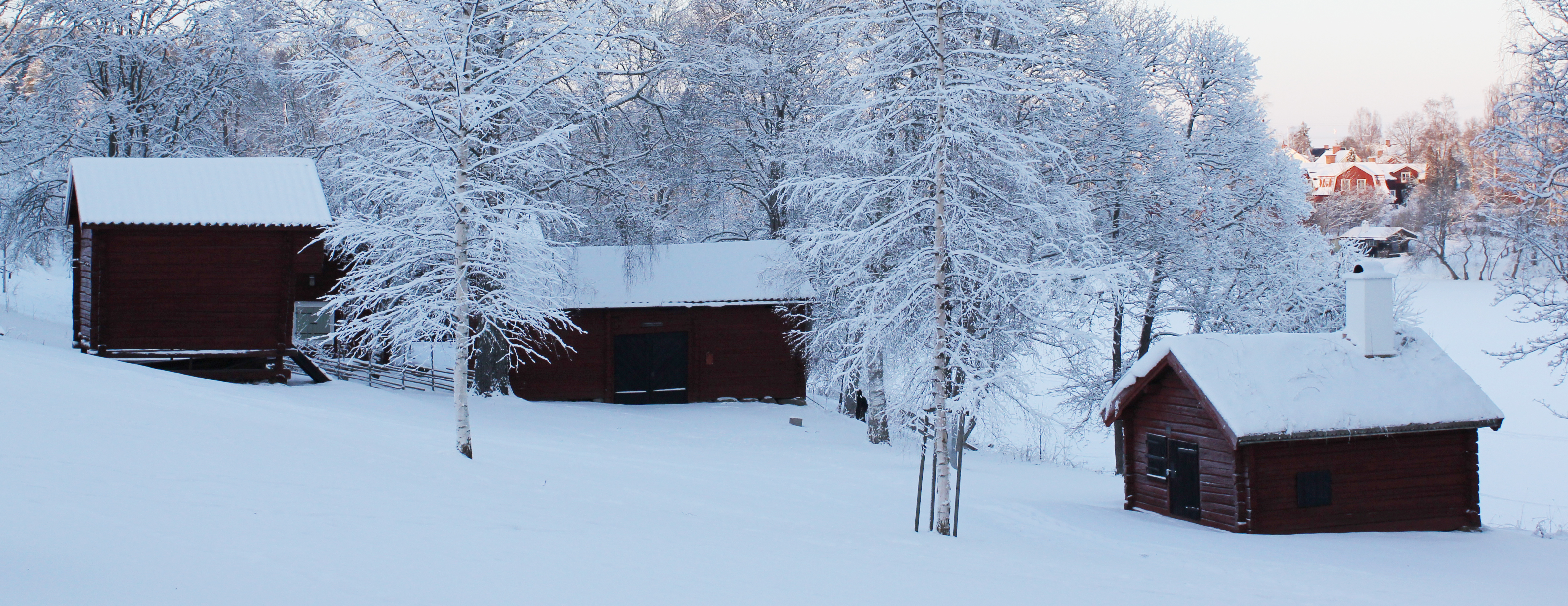 Hedemora gammelgård, Hedemora, Sweden